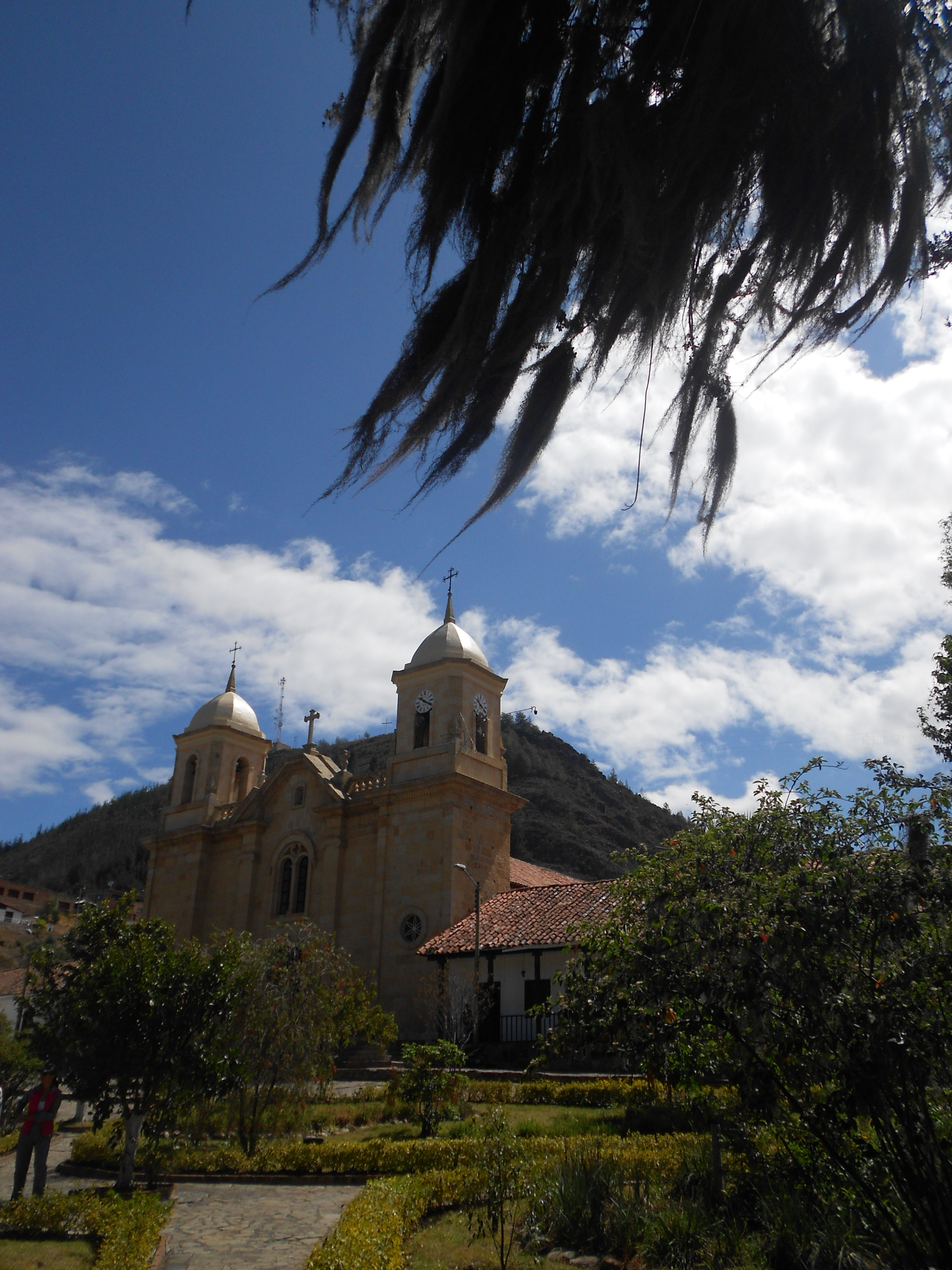 Zona urbana del bello pueblo de Cucunuba, sus calles, sus, parques,su iglesia, todo su interior que evoca la paz y costumbres sanas de su gente y del lugar. Esta fotografía fue tomada en un área protegida de Colombia con el código 1221 del RUNAP.